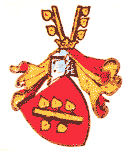 Wappen der von der Linde(n), eines alten preußischen Adelsgeschlechts, das seinen Ursprung in den Niederlanden haben soll und das sich auch nach Schlesien und Schweden ausbreiten konnte. Die Familie besteht gegenwärtig fort.